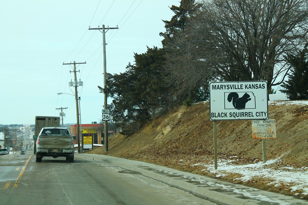 Marysville, Kansas on US Route 36.